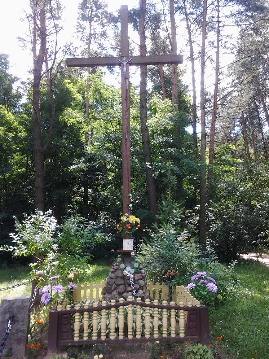 Krzyż - Nowiny Brdowskie 2011